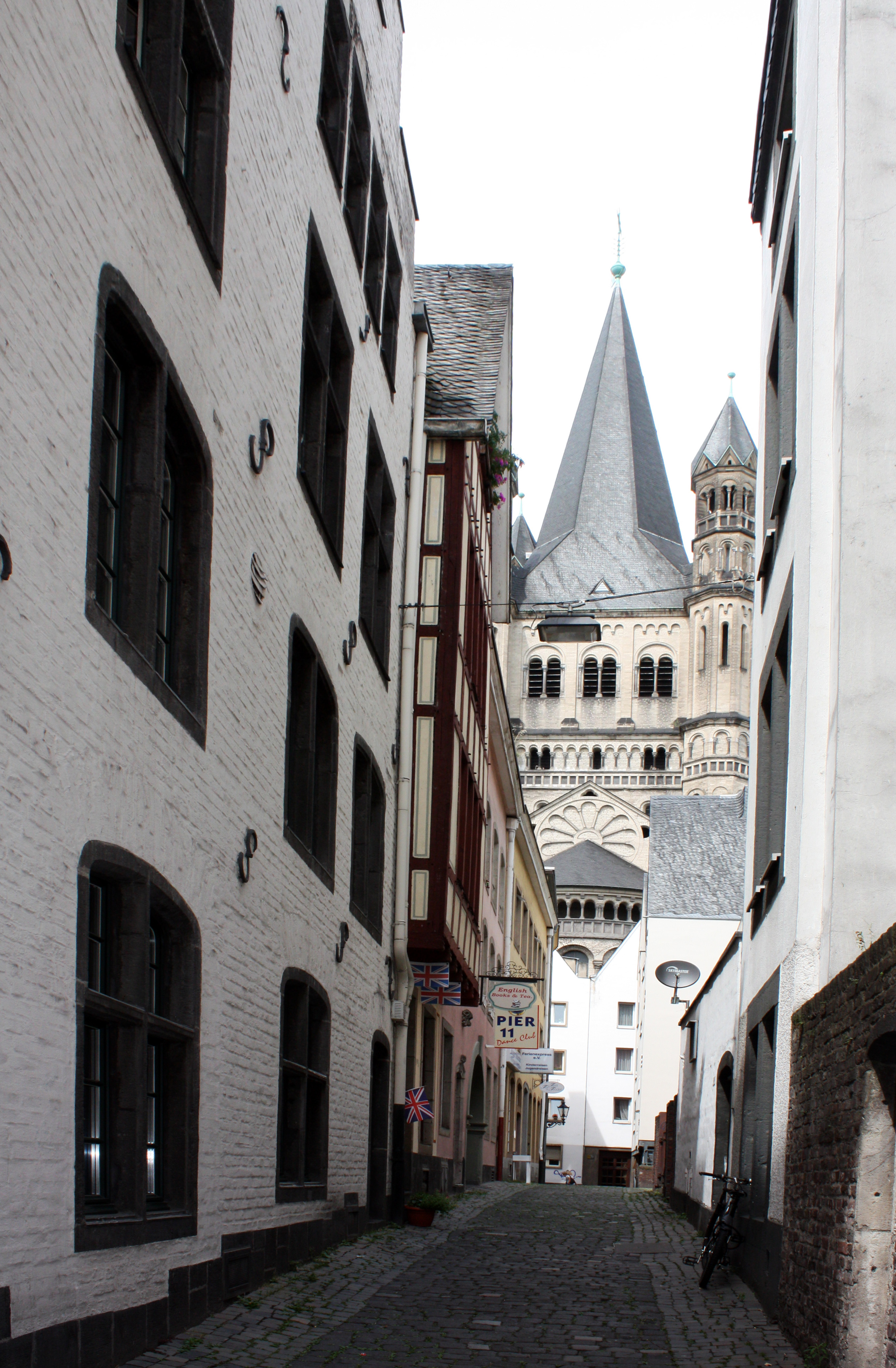 Kölner Altstadt , „Auf dem Rothenberg“